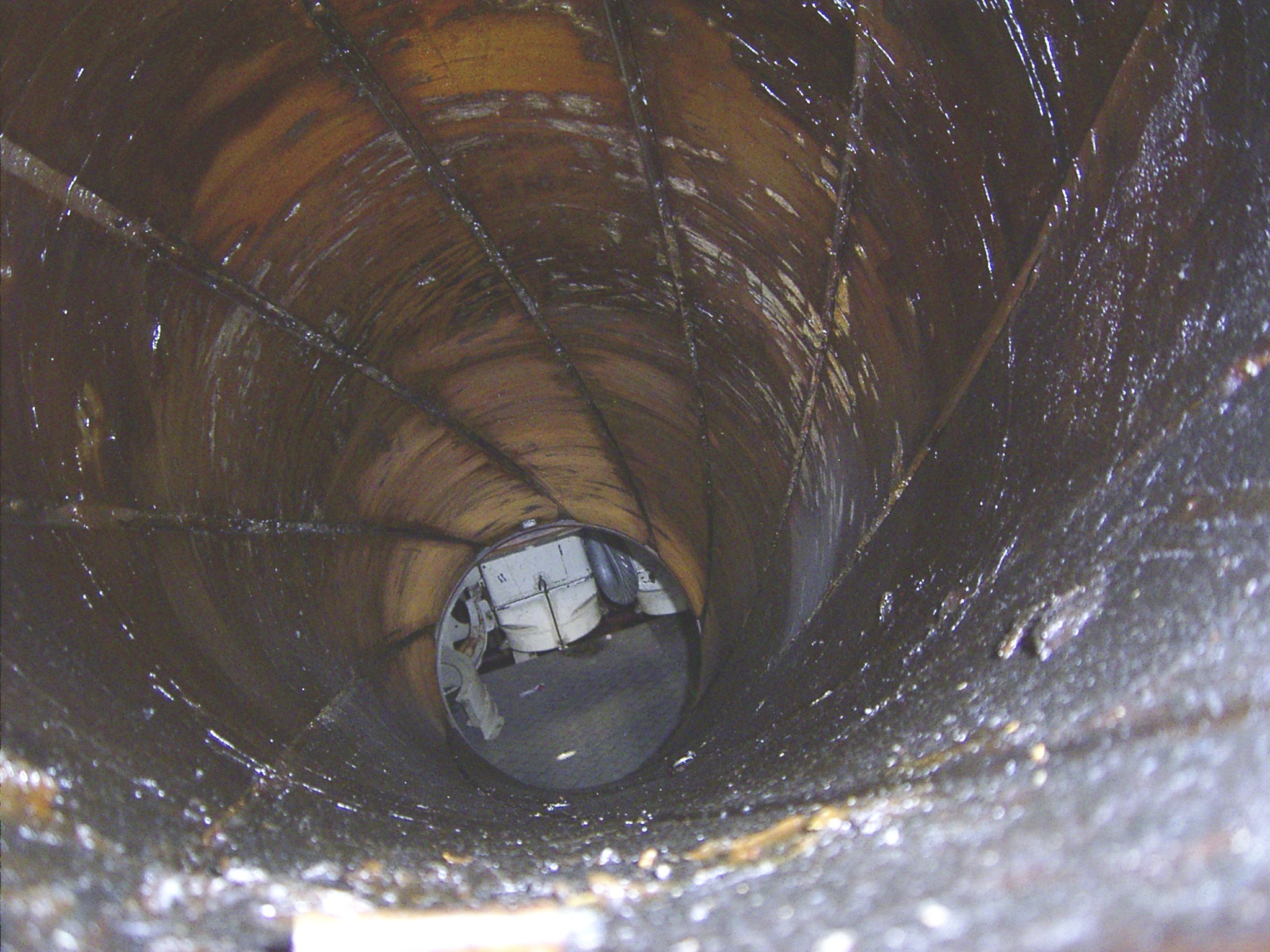 Innenansicht des Rohres eines Sturmtigers. Der Verschluss ist geöffnet und der Boden des Kampfraumes sichtbar. Aufgenommen im Deutschen Panzermuseum Munster